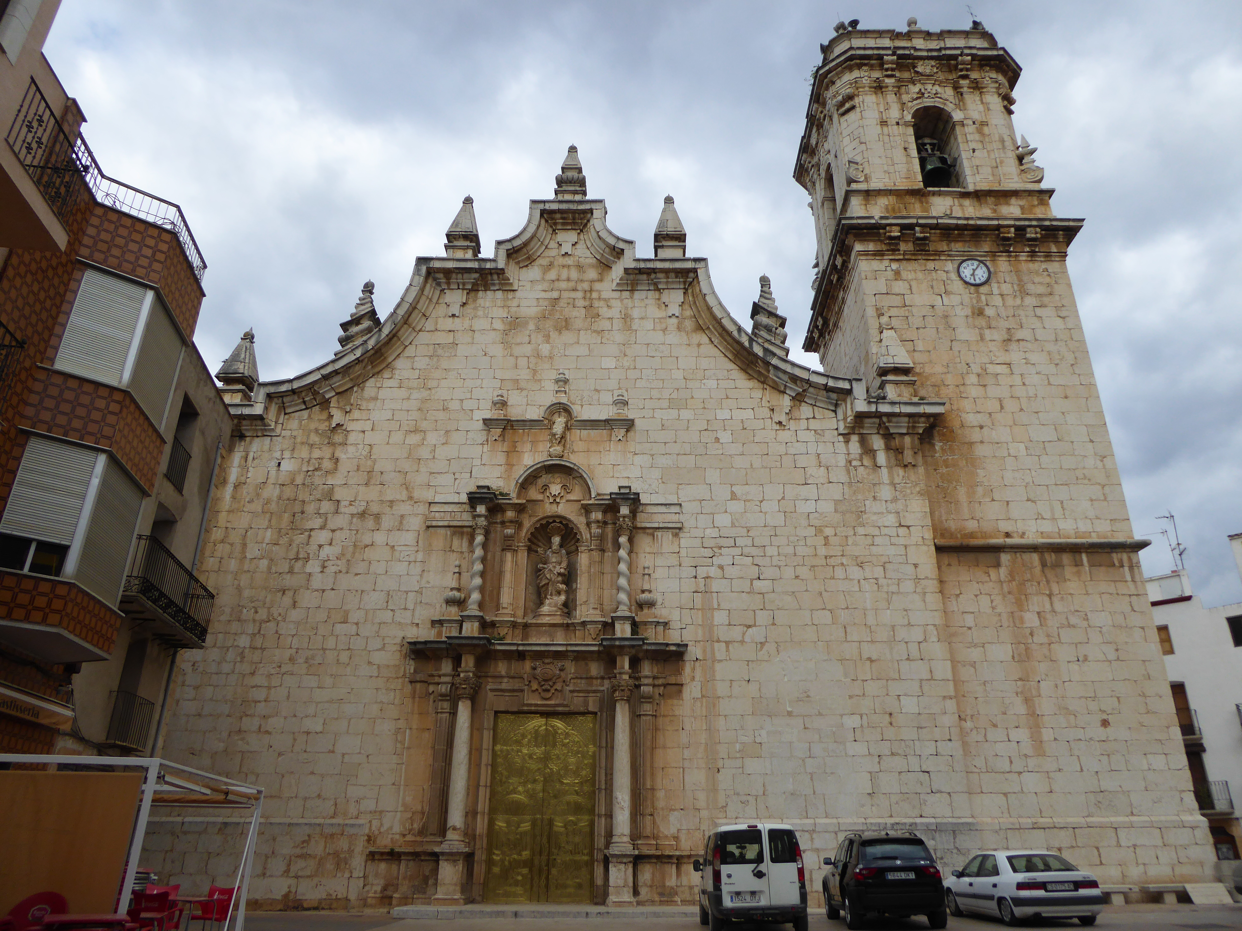 Església parroquial de Sant Bartomeu (la Jana) 03.070-003.